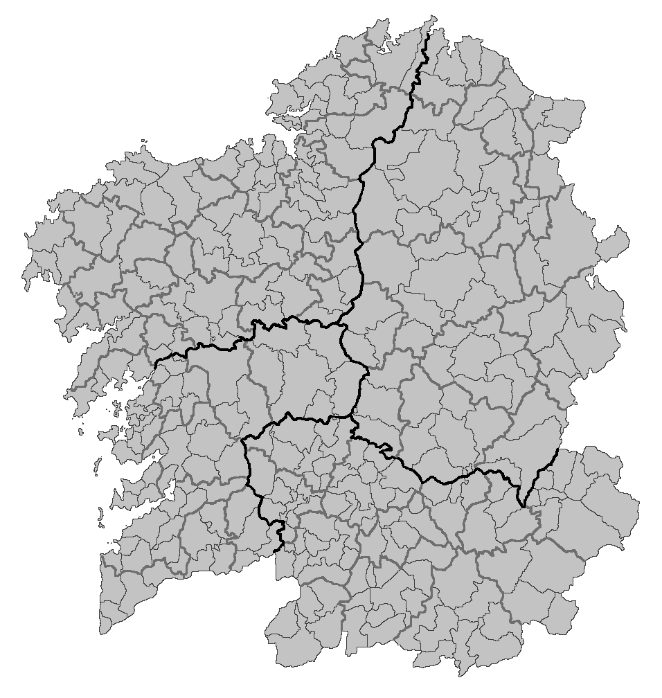 Mapa blanco de los Concellos de Galicia.